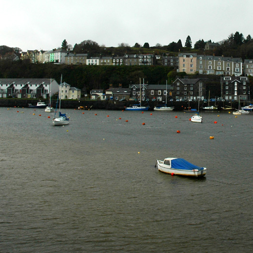 Porthmadog